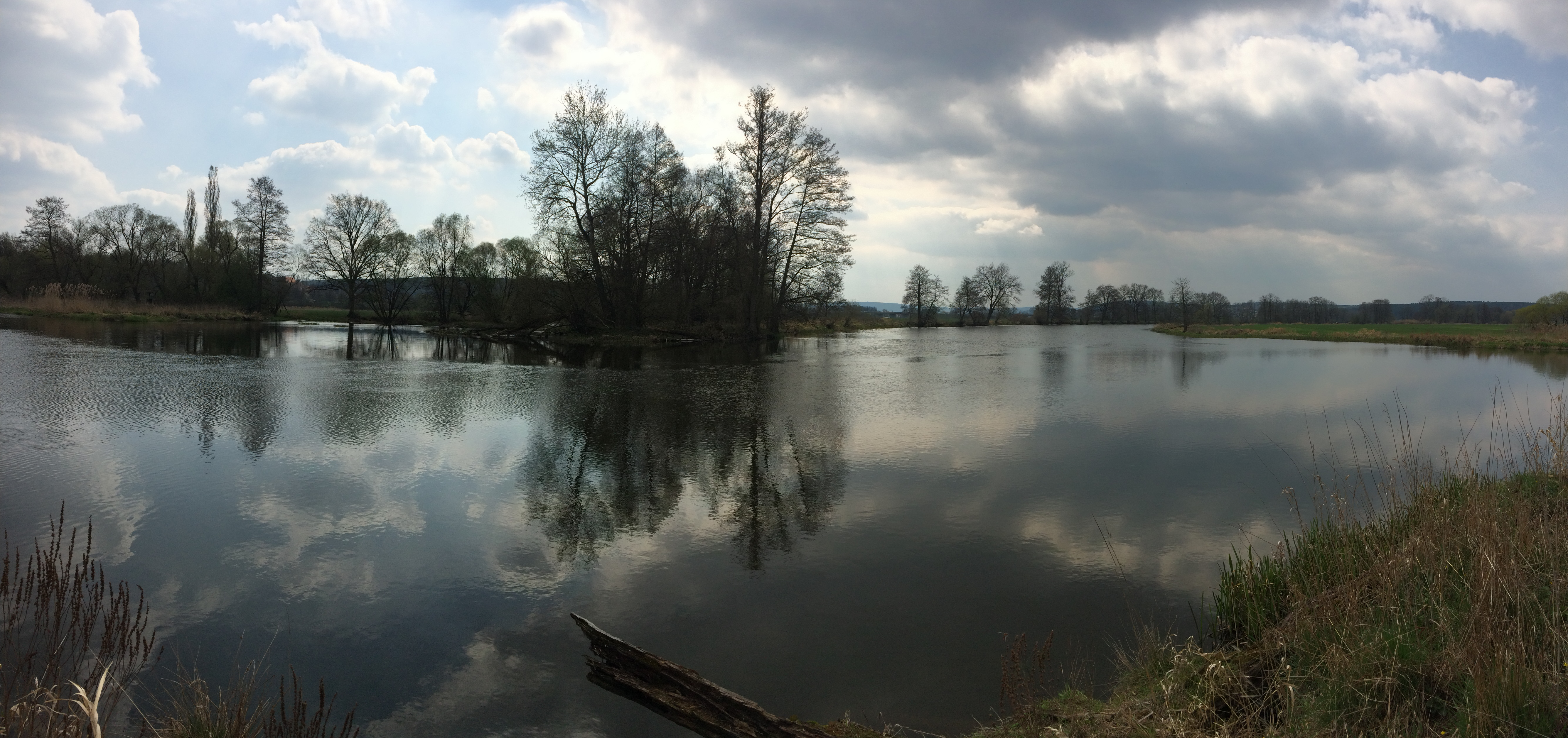 Hollergraben (Wehr) bei Fronberg (Schwandorf)